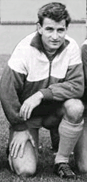 Title: DDR-Fußball-Oberligamannschaften Factual corrections and alternative descriptions are encouraged separately from the original description. Additionally errors can be reported at this page to inform the Bundesarchiv. Original historic description: Zentralbild-Koard-12.12.69-ma-Rostock: DDR-Fußball-Oberligamannschaften. FC Hansa Rostock: Stehend v.l.n.r.: Jürgen Decker, Wolfgang Barthels, Joachim Streich, Herbert Pankau, Gerd Kostmann, Klaus-Peter Stein, Helmut Schükler, Lothar Hahn und Manfred Rump. Davor v.l.nr.: Klaus-Dieter Seehaus, Gerhard Brümmer, Dieter Schneider, Jürgen Heinsch, Helmut Hergesell und Gerd Sakritz.